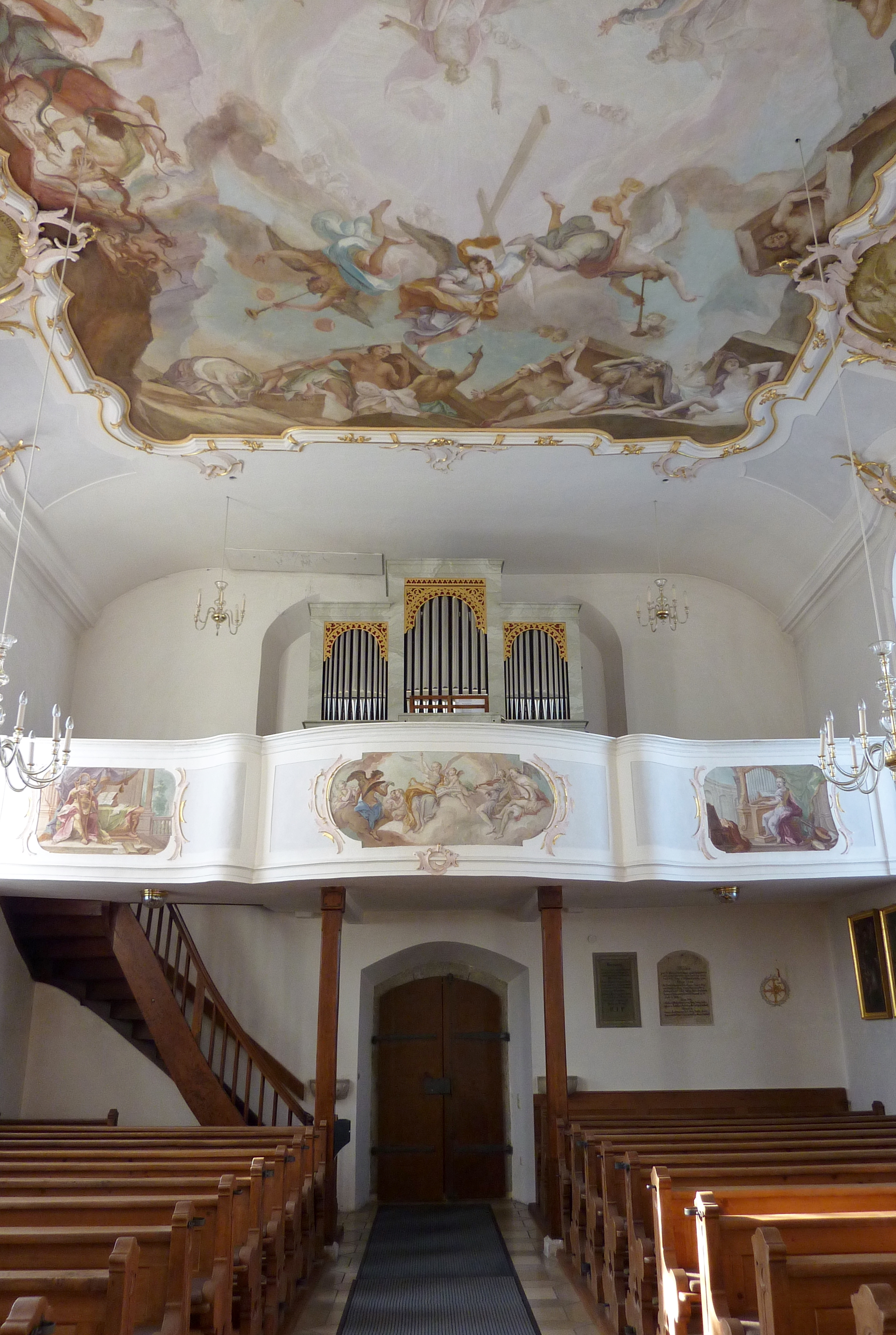 Katholische Pfarrkirche St. Michael in Oberbechingen, einem Ortsteil der Gemeinde Bachhagel im Landkreis Dillingen an der Donau (Bayern), Langhaus und Empore